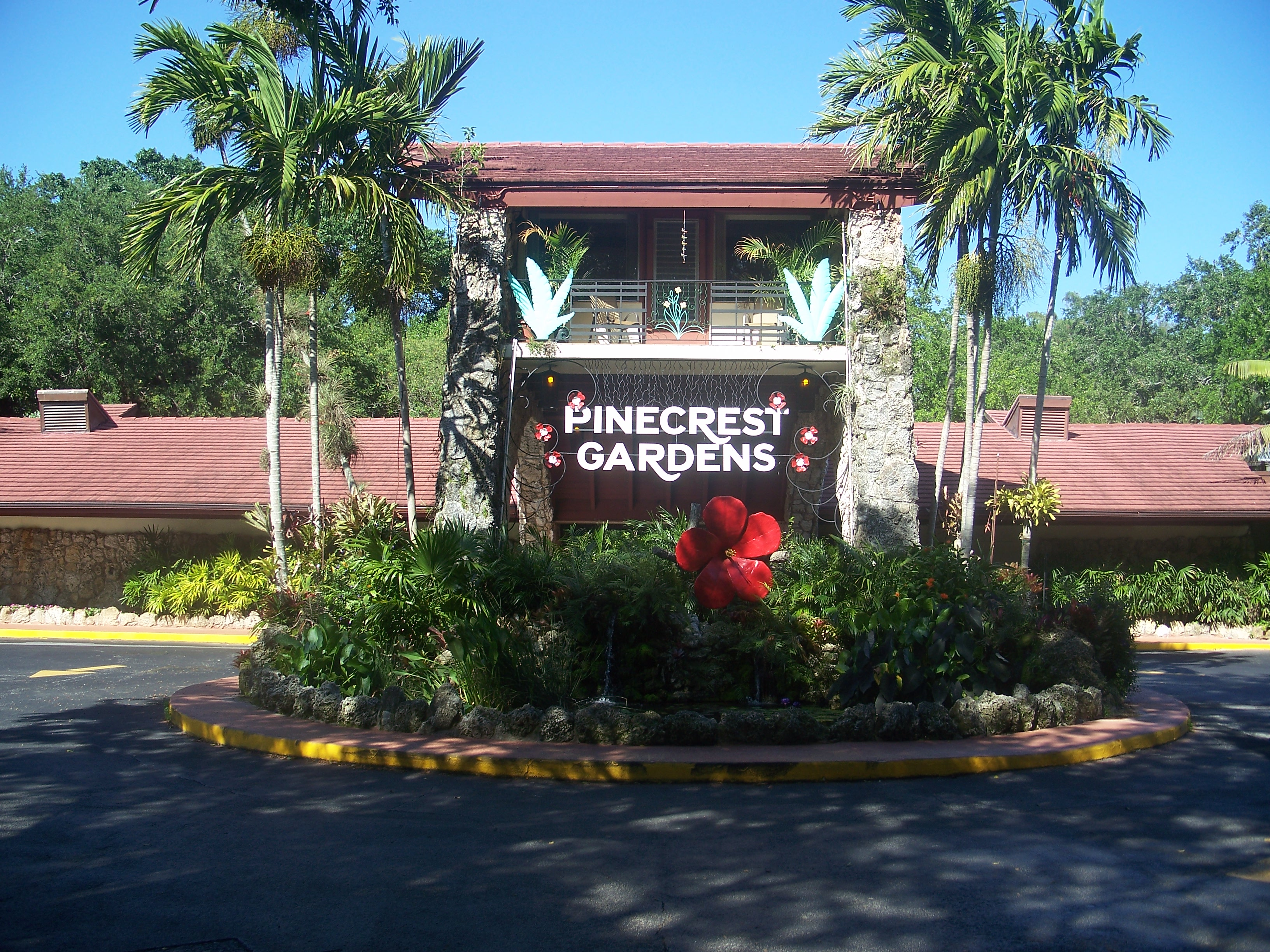 Pinecrest, Florida: Pinecrest Gardens: Newer entrance